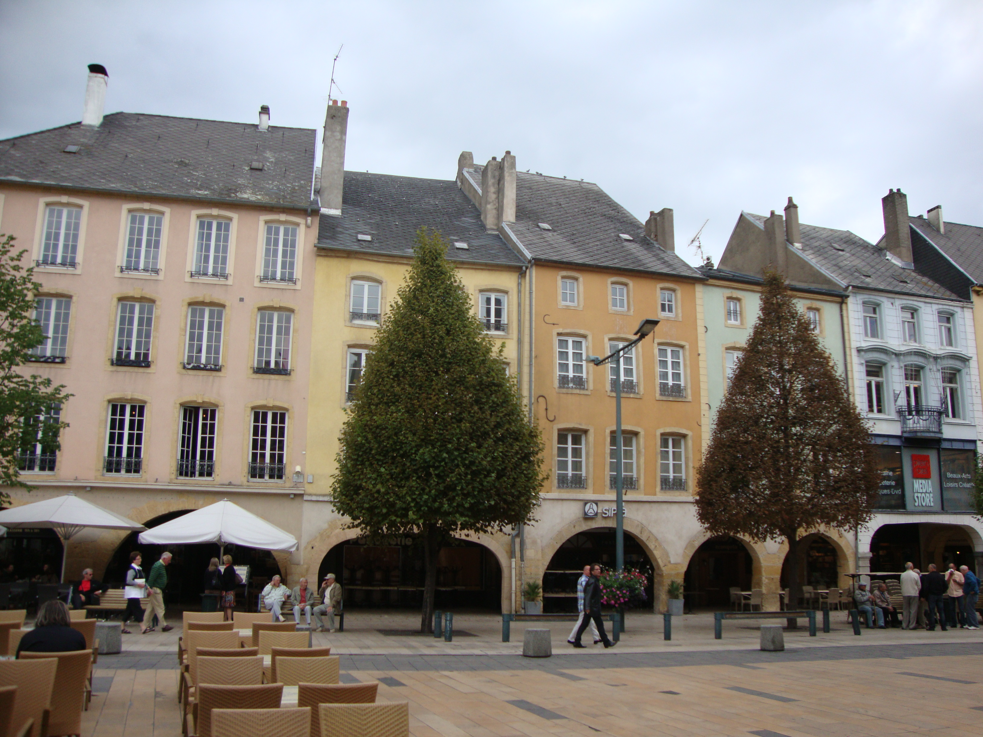 Thionville (57) -Place du Marché